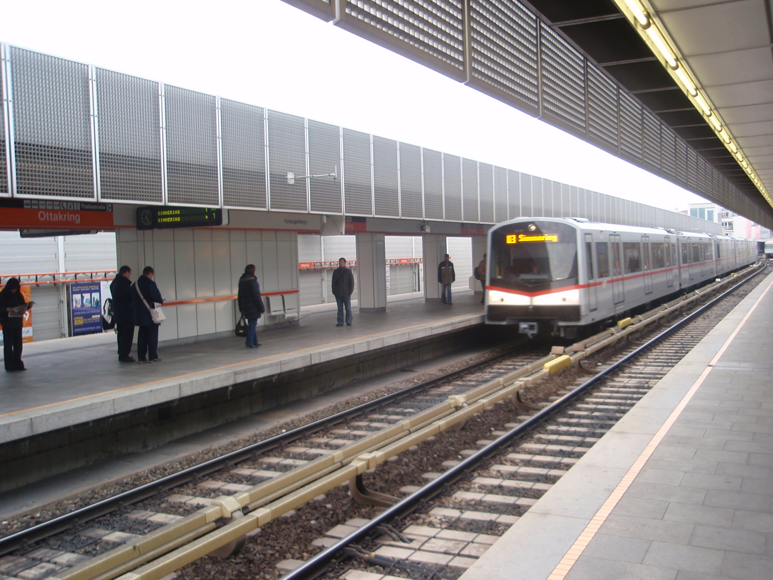 U3-Station Ottakring